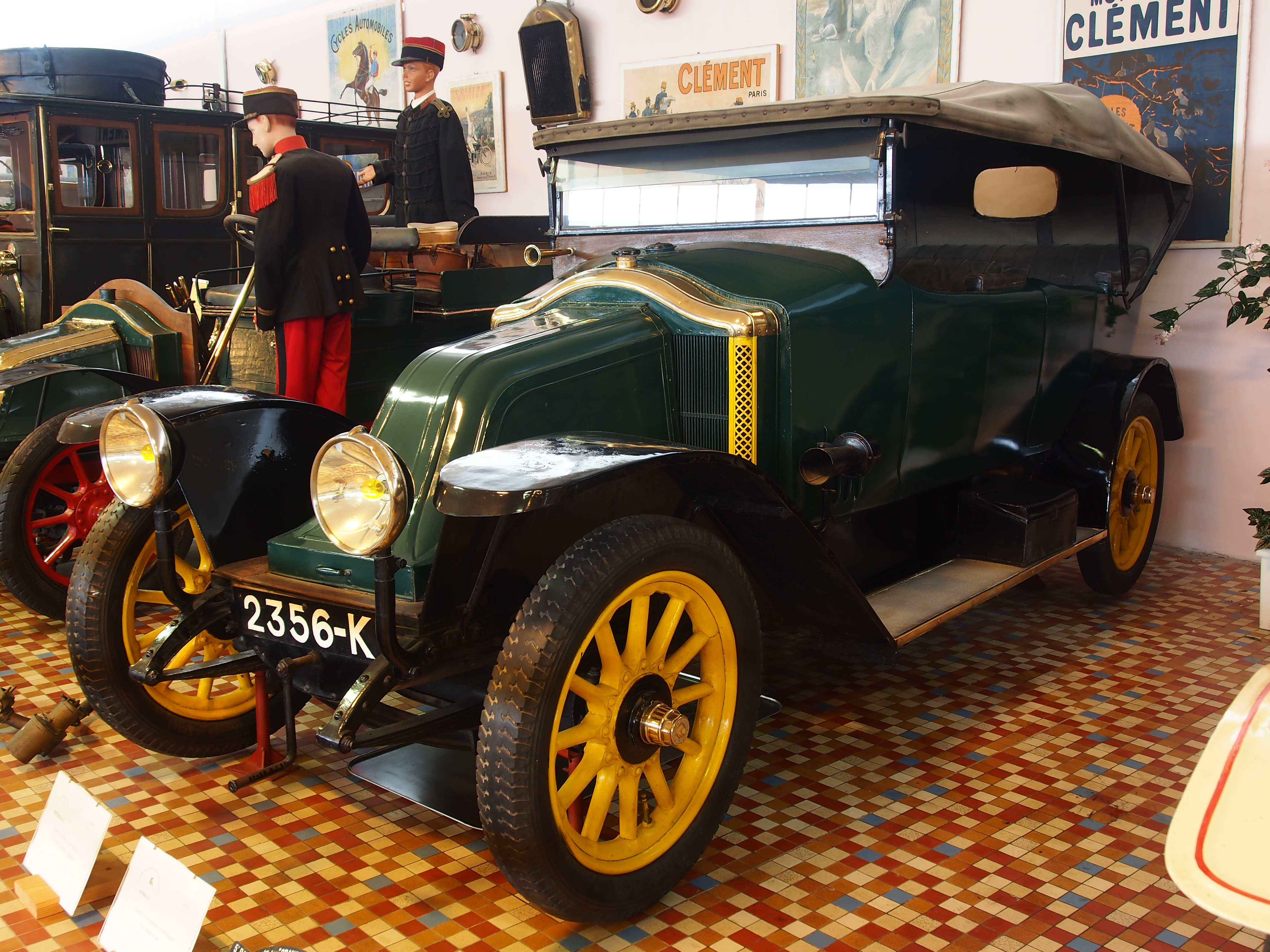 Photographed at the Musée Automobile de Vendée, France.